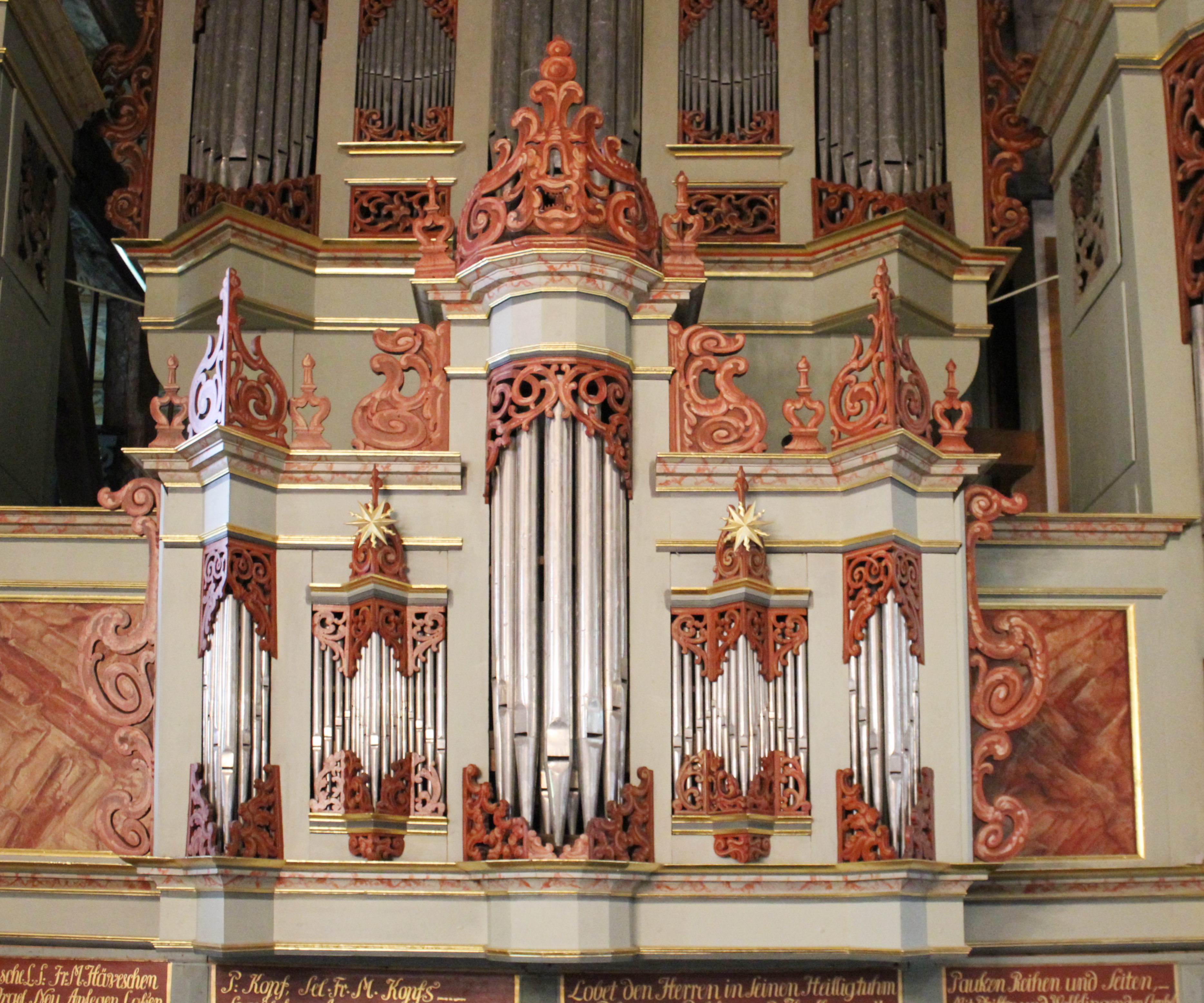 Orgel der St.-Jacobi-Kkirche Lüdingworth, Cuxhaven, Niedersachsen, Deutschland